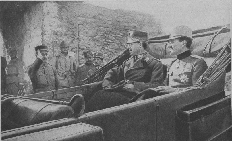 Les rois Alexandre I de Serbie et Alexandre I de Grèce au Q.G des forces serbes.